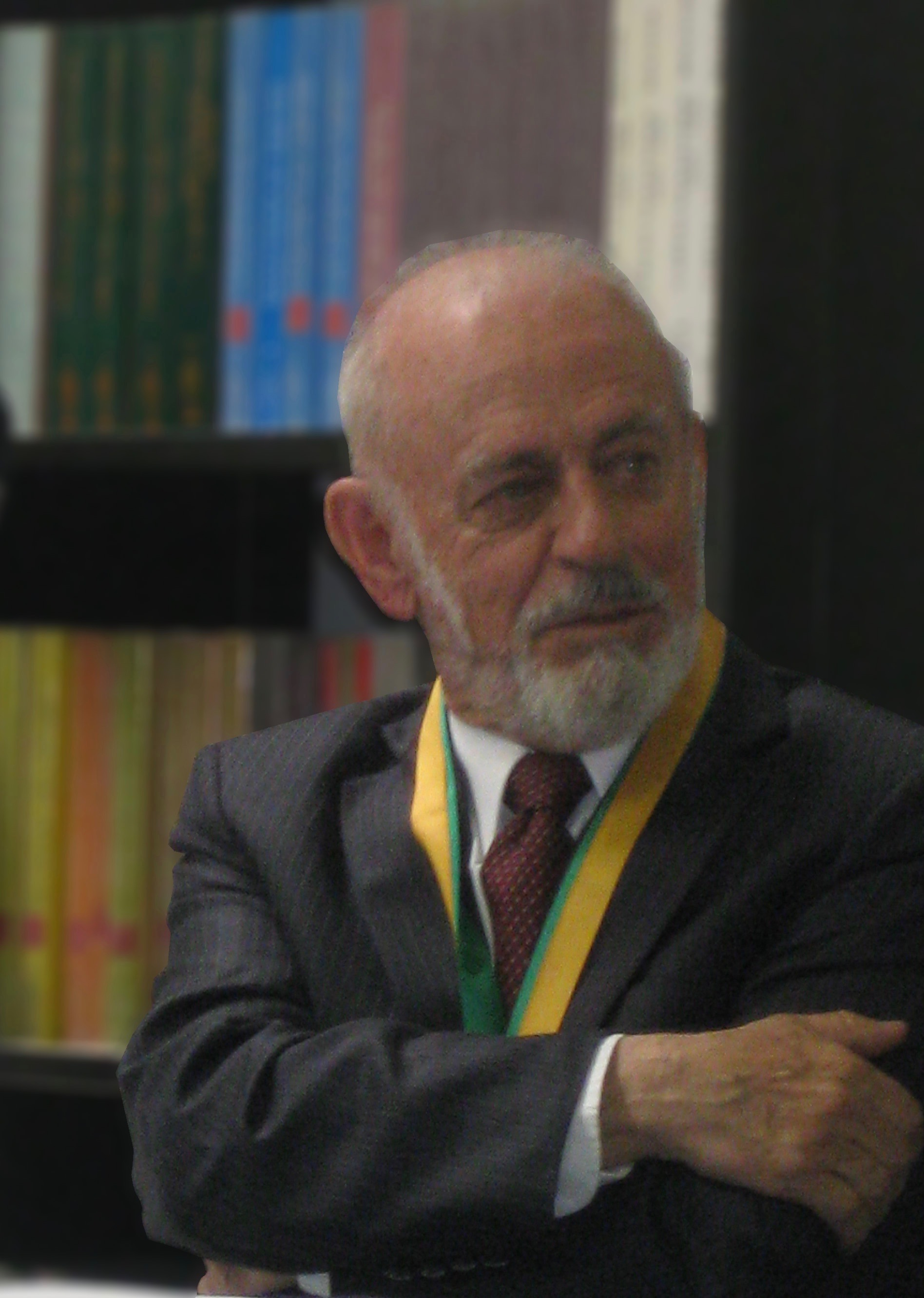 El ceramista y escultor Pablo Jaramillo en la inauguración de su museo en Sonsón. 4 de agosto de 2012